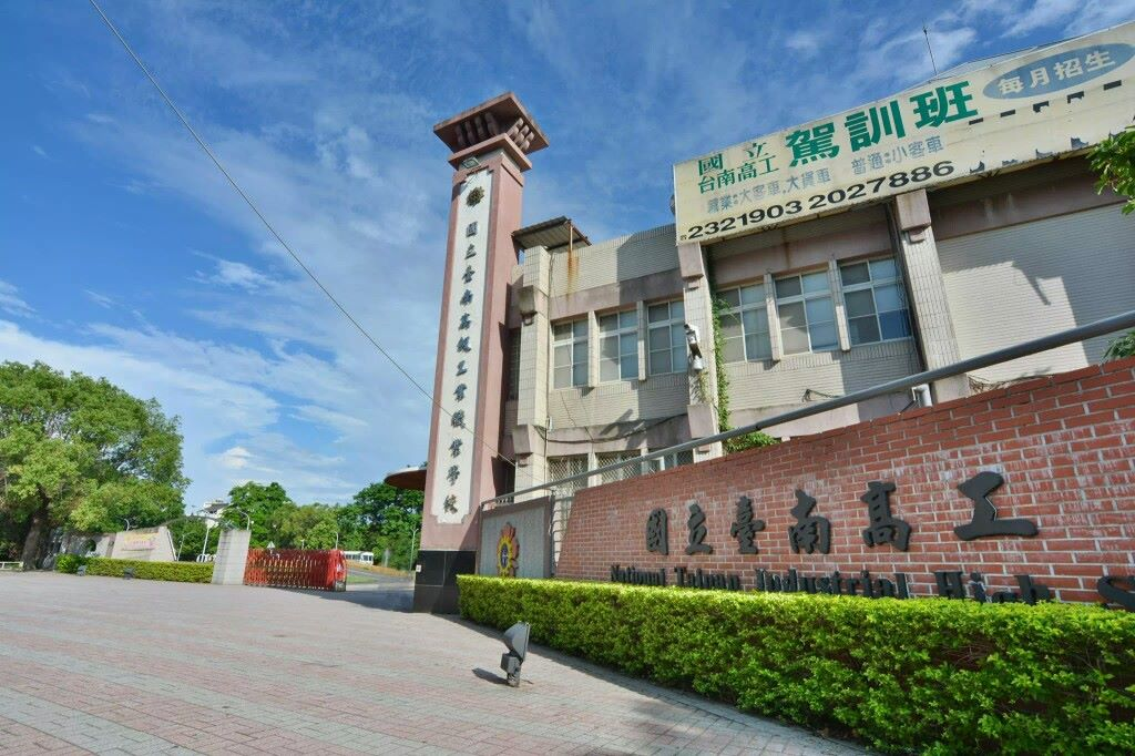 台南高工校門口